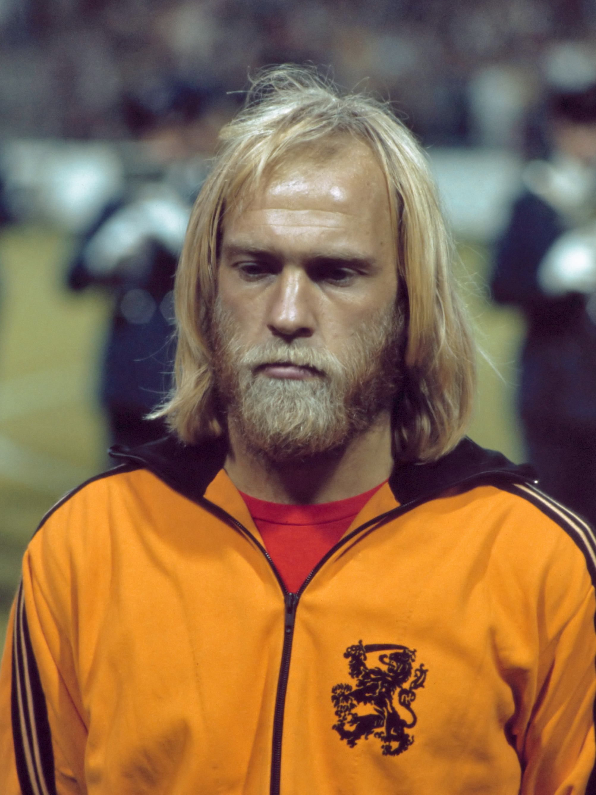 Willy Brokamp